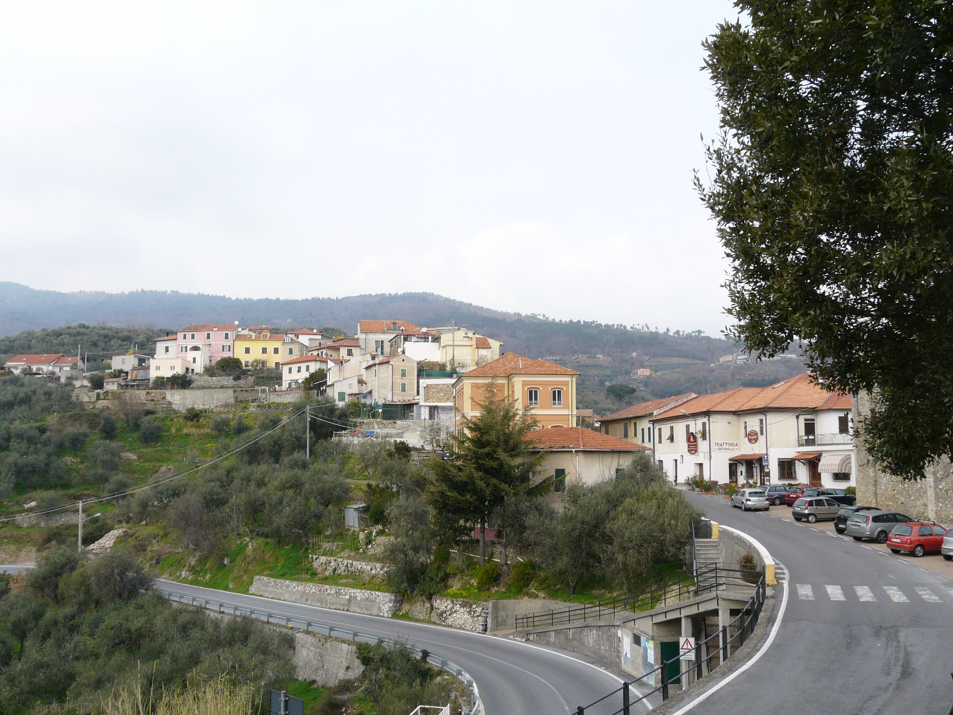 Bardino Vecchio, Tovo San Giacomo, Liguria, Italia